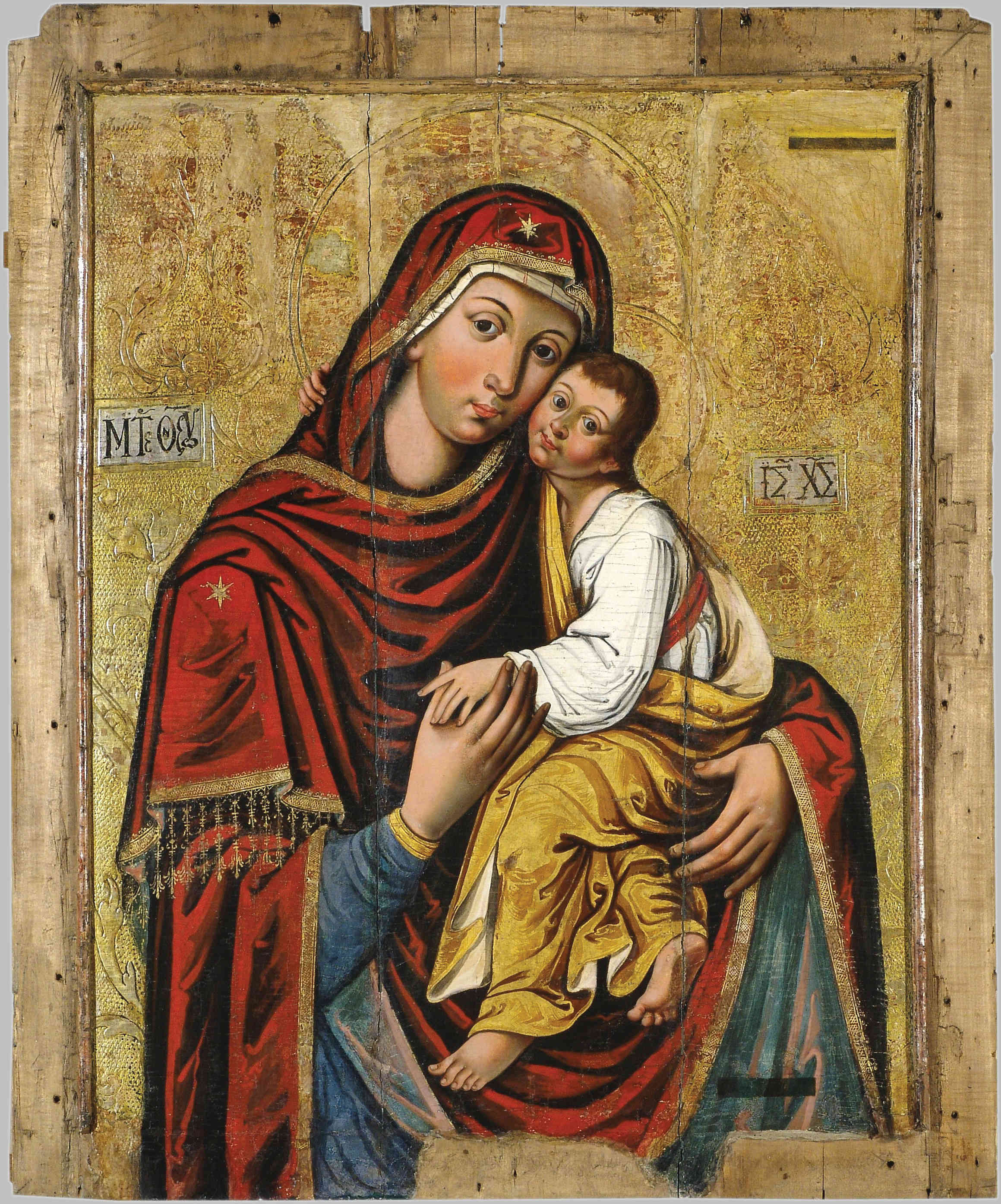 108,5×89 см